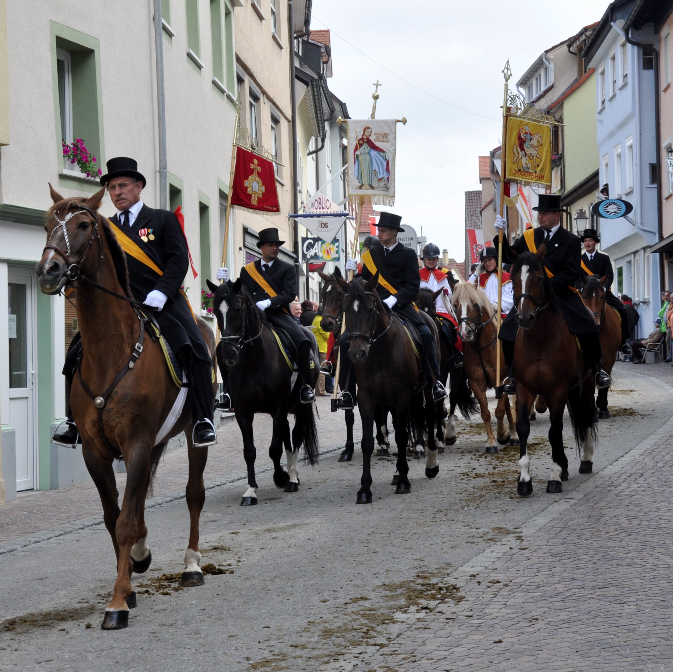 Weingarten, Blutritt 2011, Blutreitergruppe Rötenbach (Gemeinde Wolfegg)